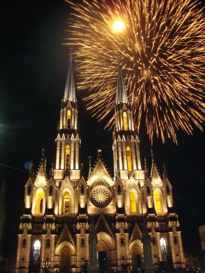 Iluminacion del Santuario Guadalupano en Zamora Michoacan MEXICO